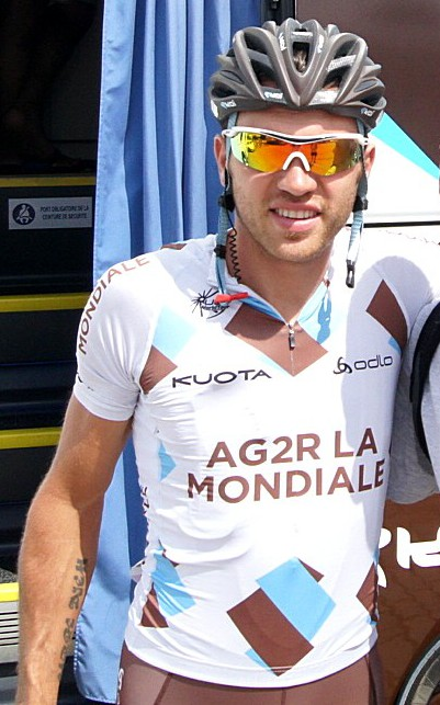 Rinaldo Nocentini during Tour de Pologne 2012